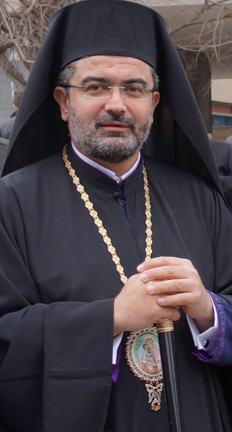 Μητροπολίτης Νειλουπόλεως Γεννάδιος